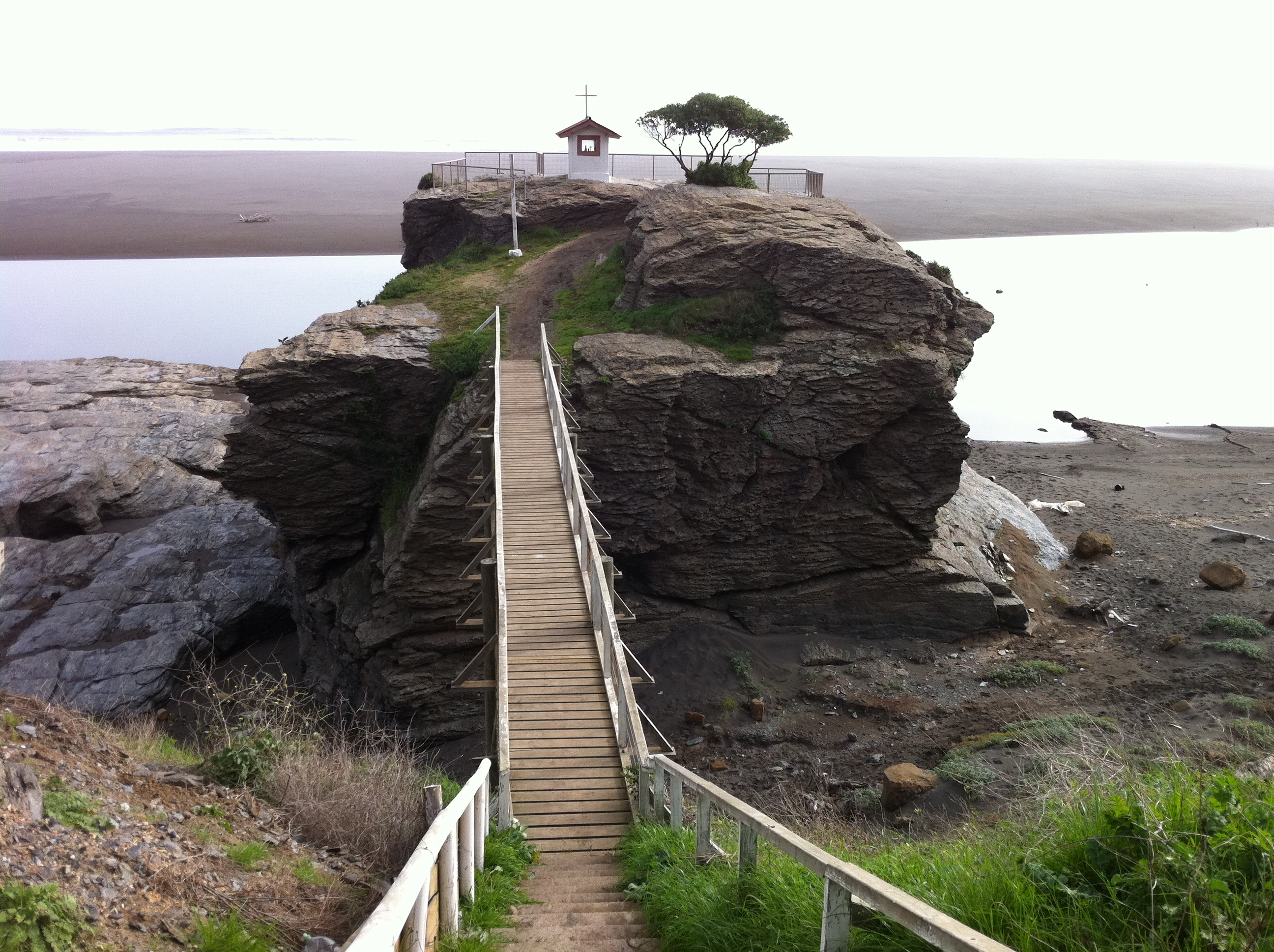 El Peñon de Iloca (Mirador San Pedro) - ©Gonzalo Baeza